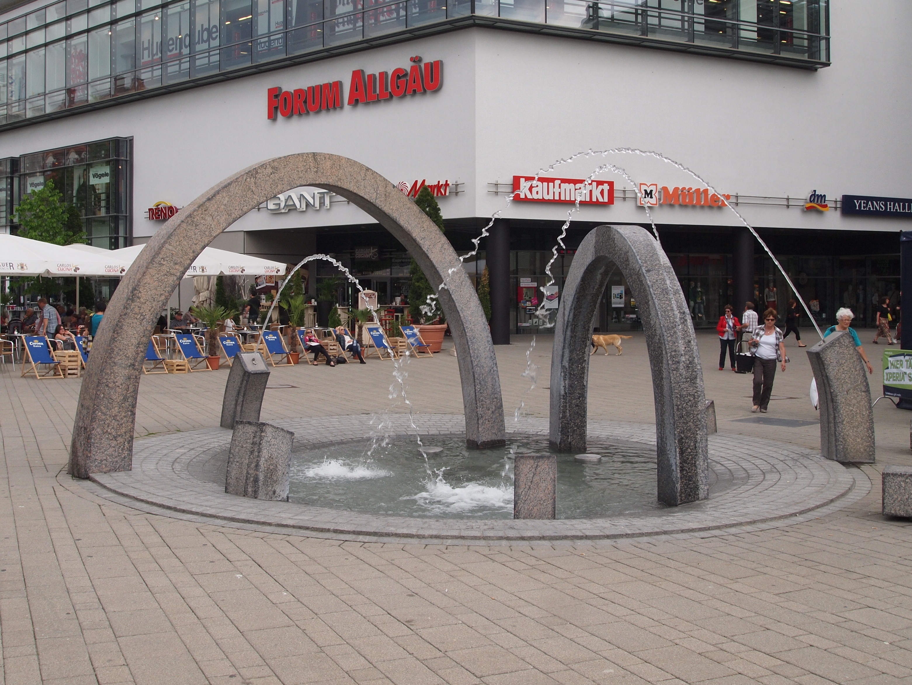 Kempten, Springbrunnen vor dem "Forum Allgäu" in Kempten